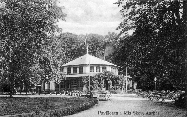 Pavillonen i Riis Skov